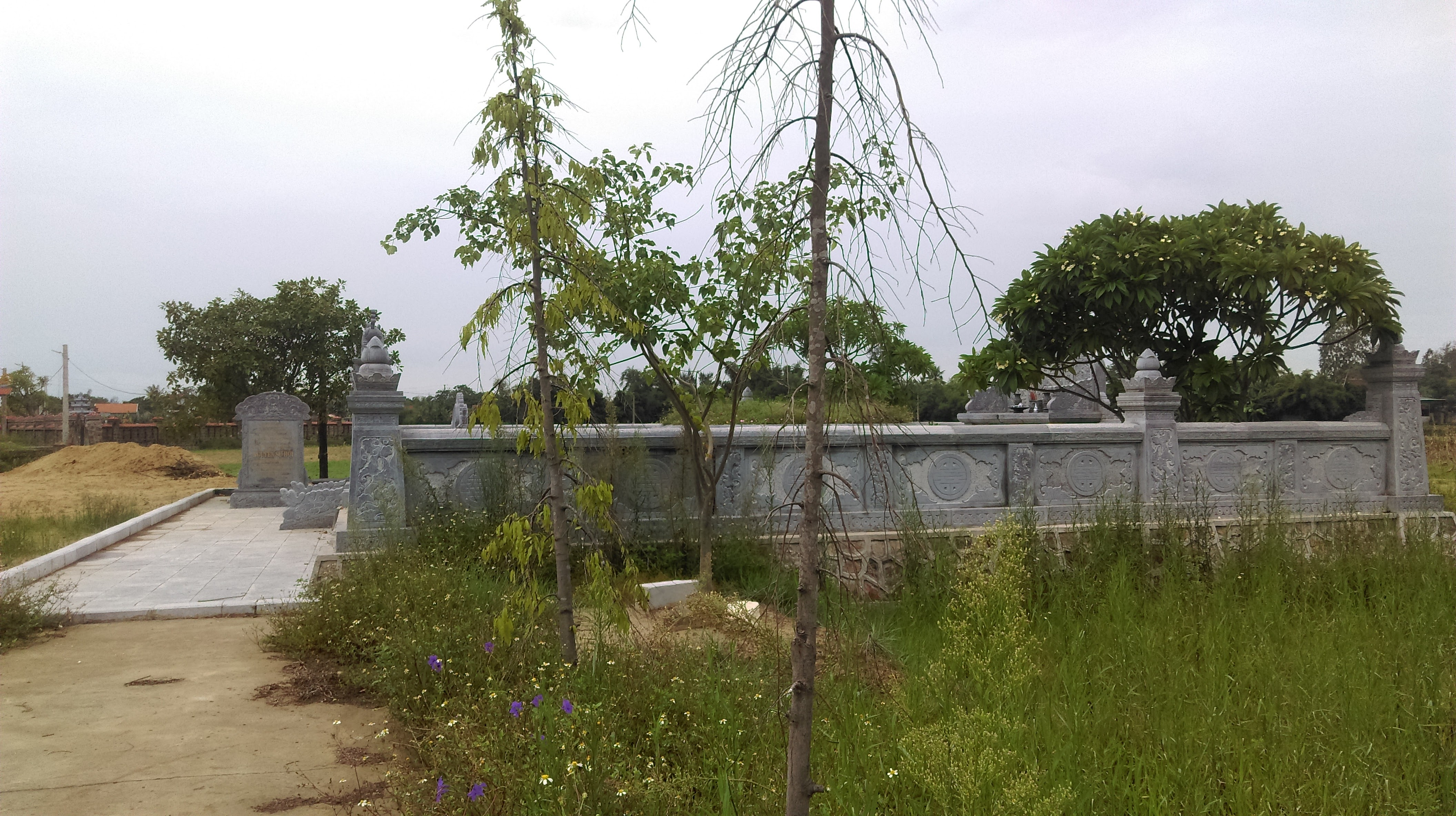 Phần mộ Nguyễn Sư Hồi 2